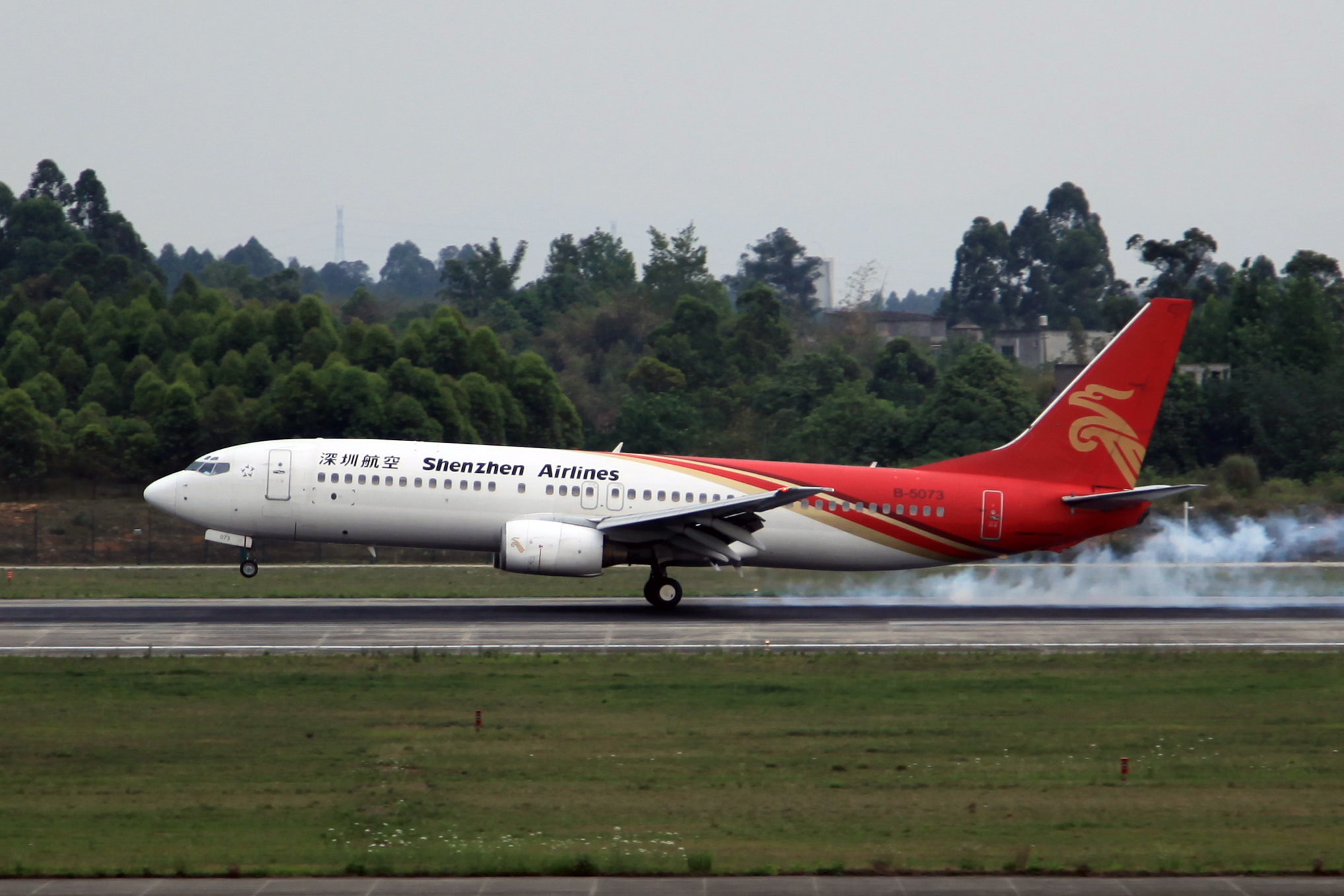 Shenzhen Airlines Boeing 737-8Q8 B-5073 @ Chengdu Shuangliu International Airport